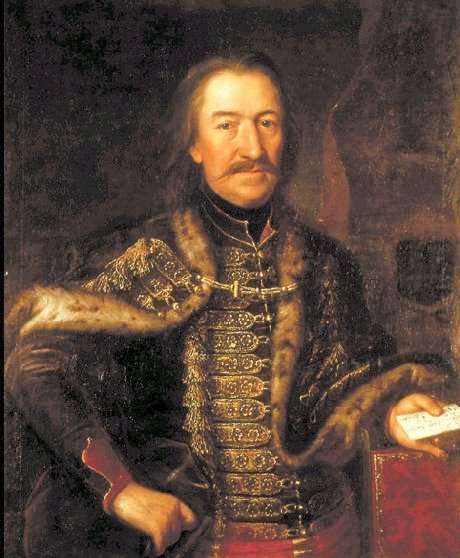 Ráday Pál, író, II. Rákóczi Ferenc kancellárja. Mányoki Ádám (1673–1757) festménye (1727)